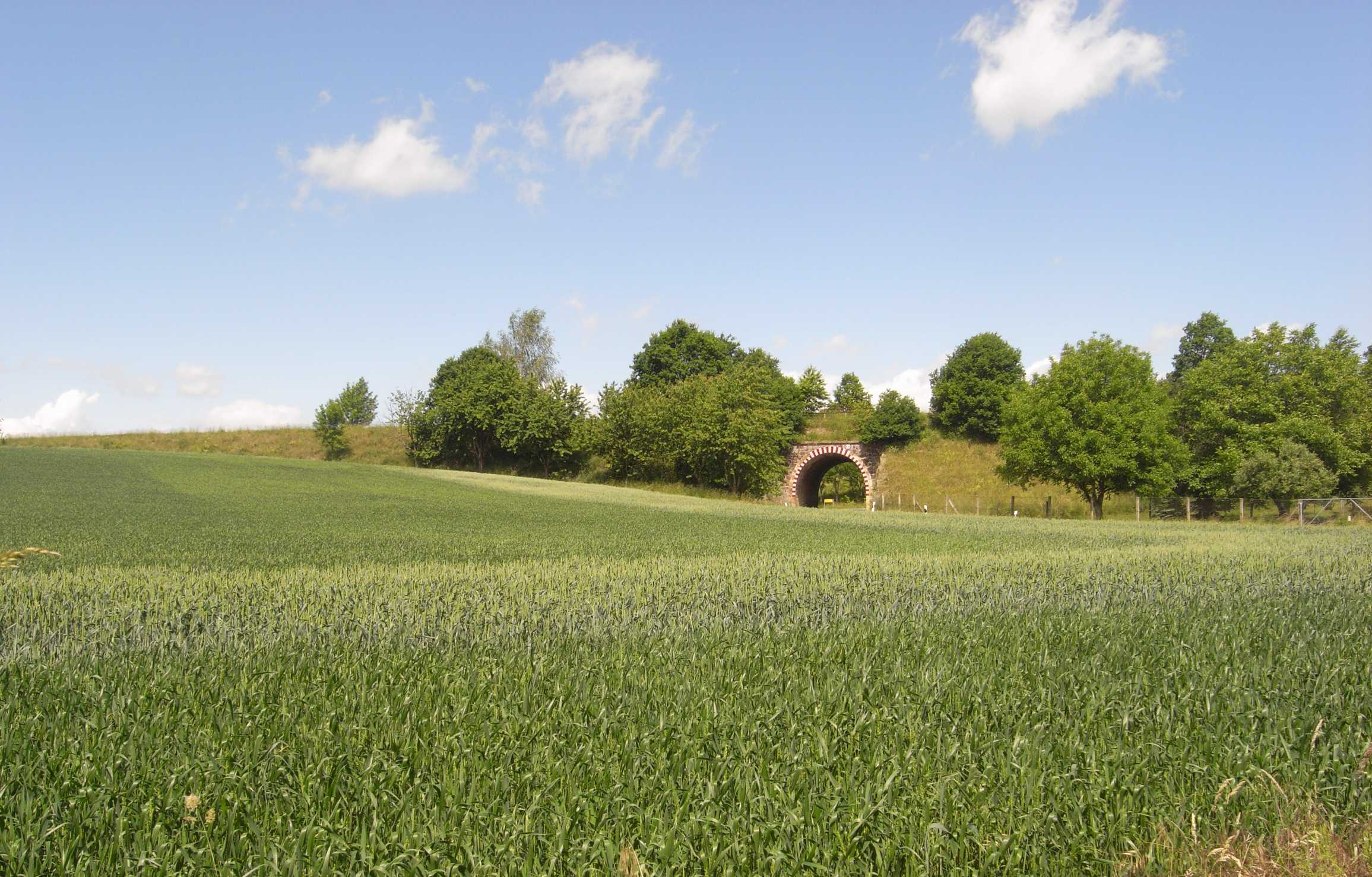 Bahnstrecke Riesa–Nossen, Eisenbahnbrücke in Kreißig, für die Landstrasse nach Rüsseina (Deutschland, Sachsen)